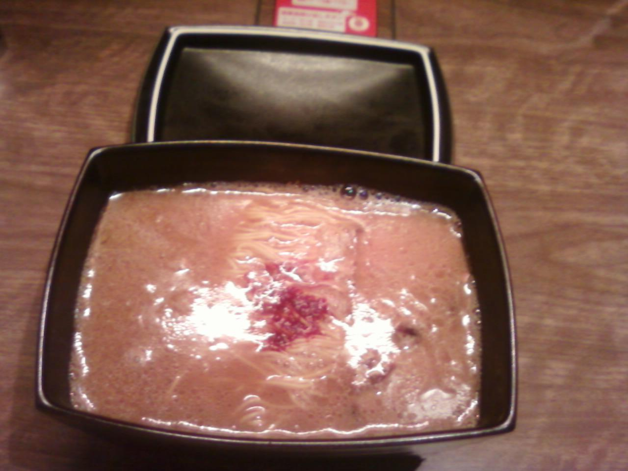 天神西通り限定ラーメン